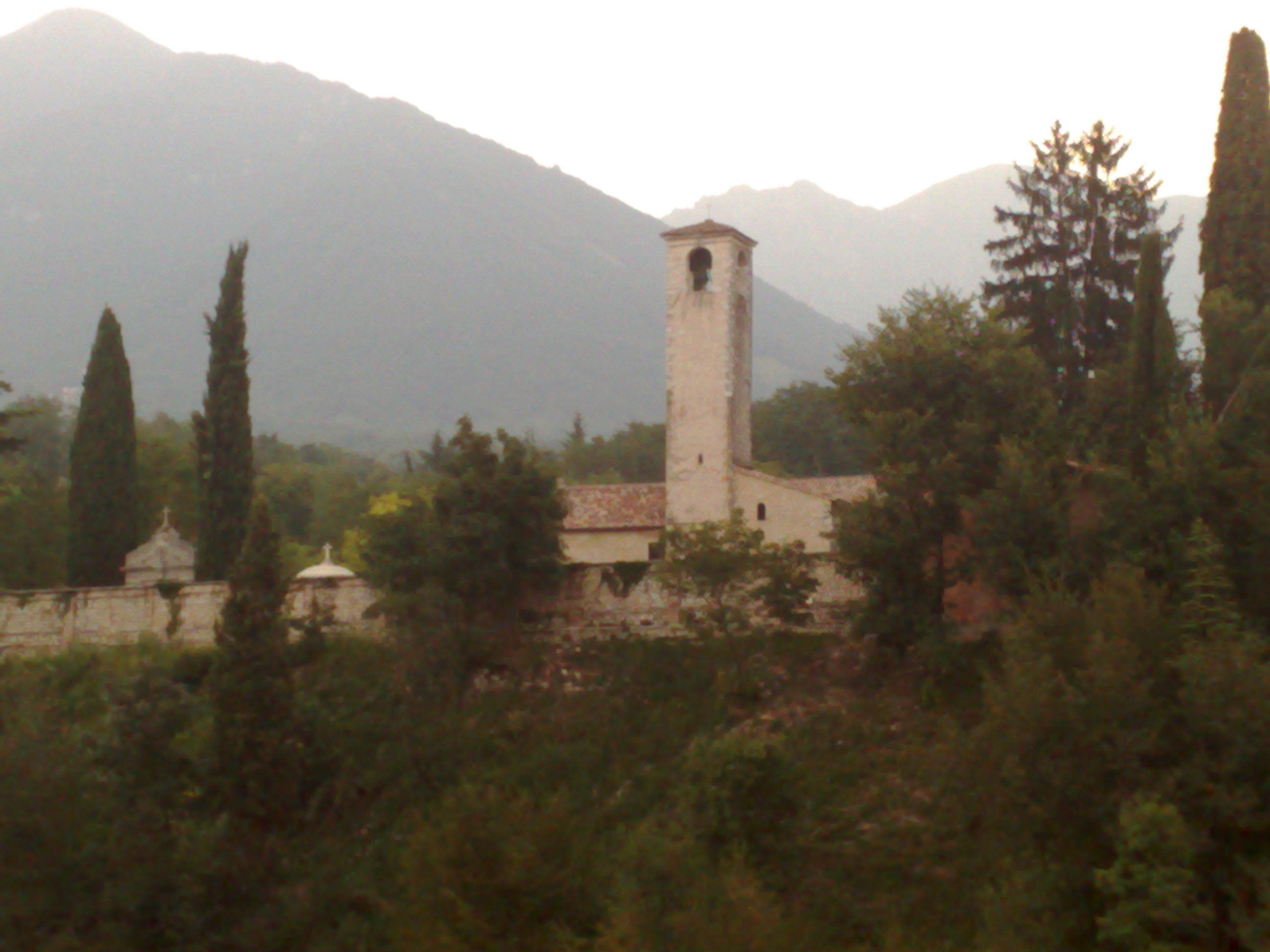 Campanile della chiesetta di San Pancrazio di fianco al cimitero di Crespano del Grappa